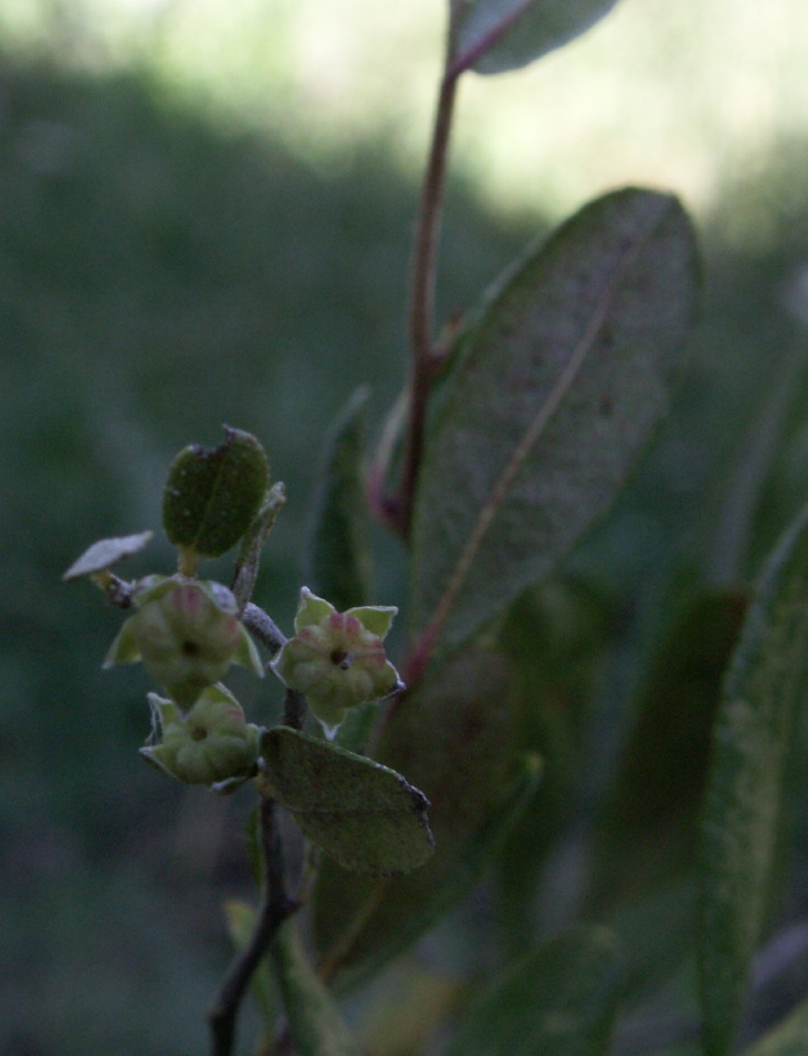 fruechte der Torfgraenke